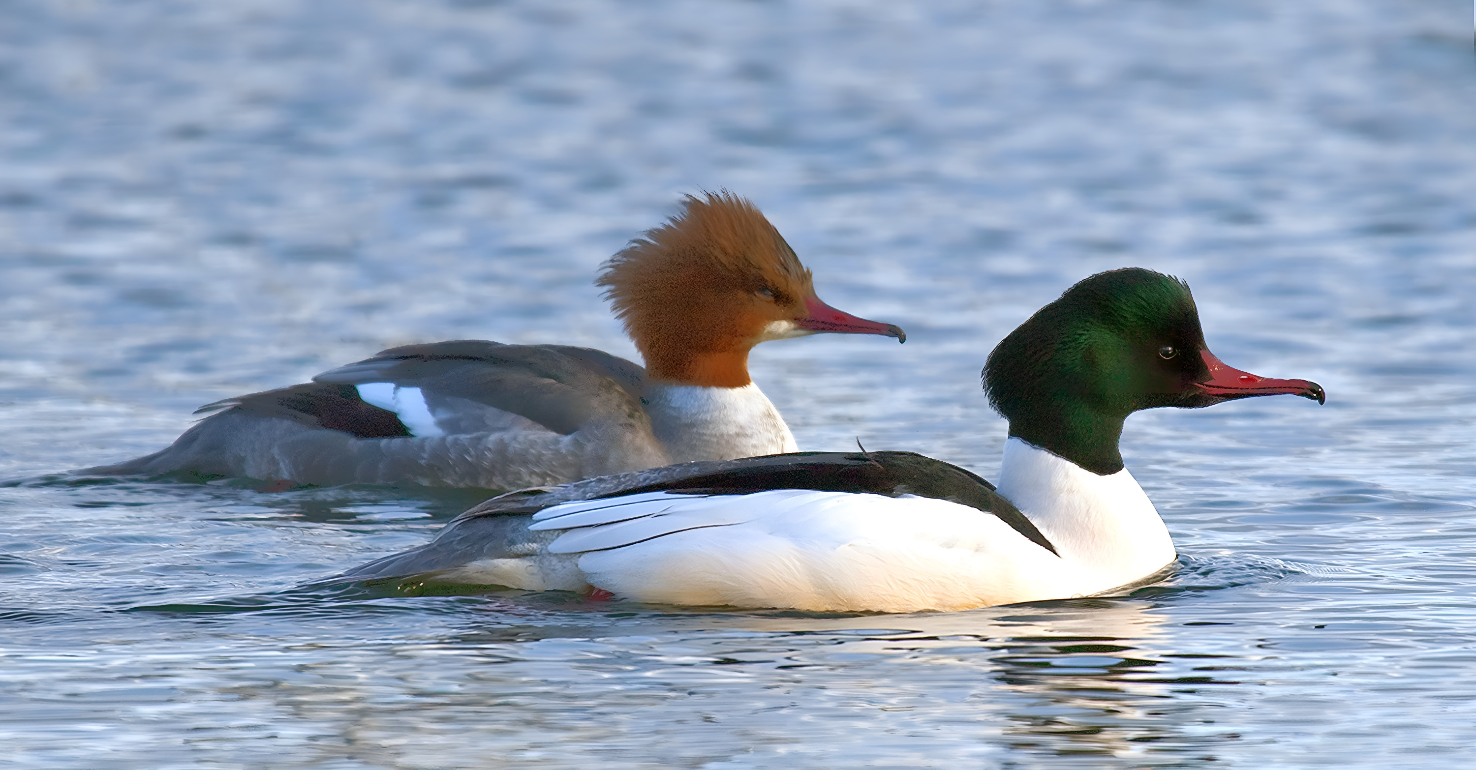 Goosander Mergus merganser, female and male, in Vaxholm, Sweden